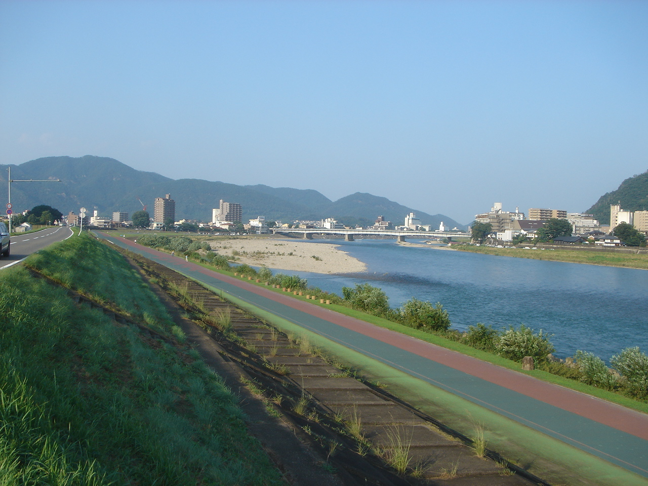 Nagara Bashi(長良橋),Gifu,Gifu,Japan(岐阜県岐阜市)で長良川の右岸堤防（下流側）より撮影。河川沿いの舗装道がw:ja:高橋尚子ロード。